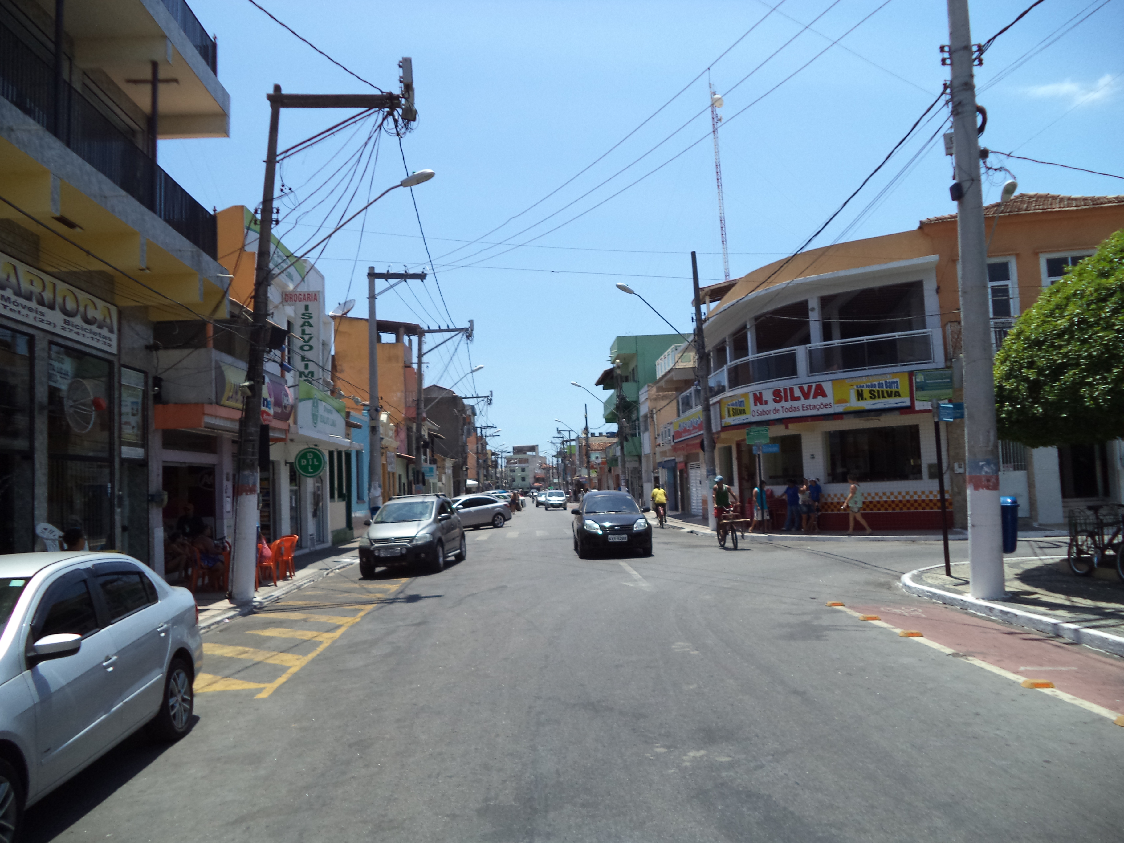 Rua Joaquim Thomaz de Aquino Filho, no centro de São João da Barra, no estado do Rio de Janeiro, Brasil.